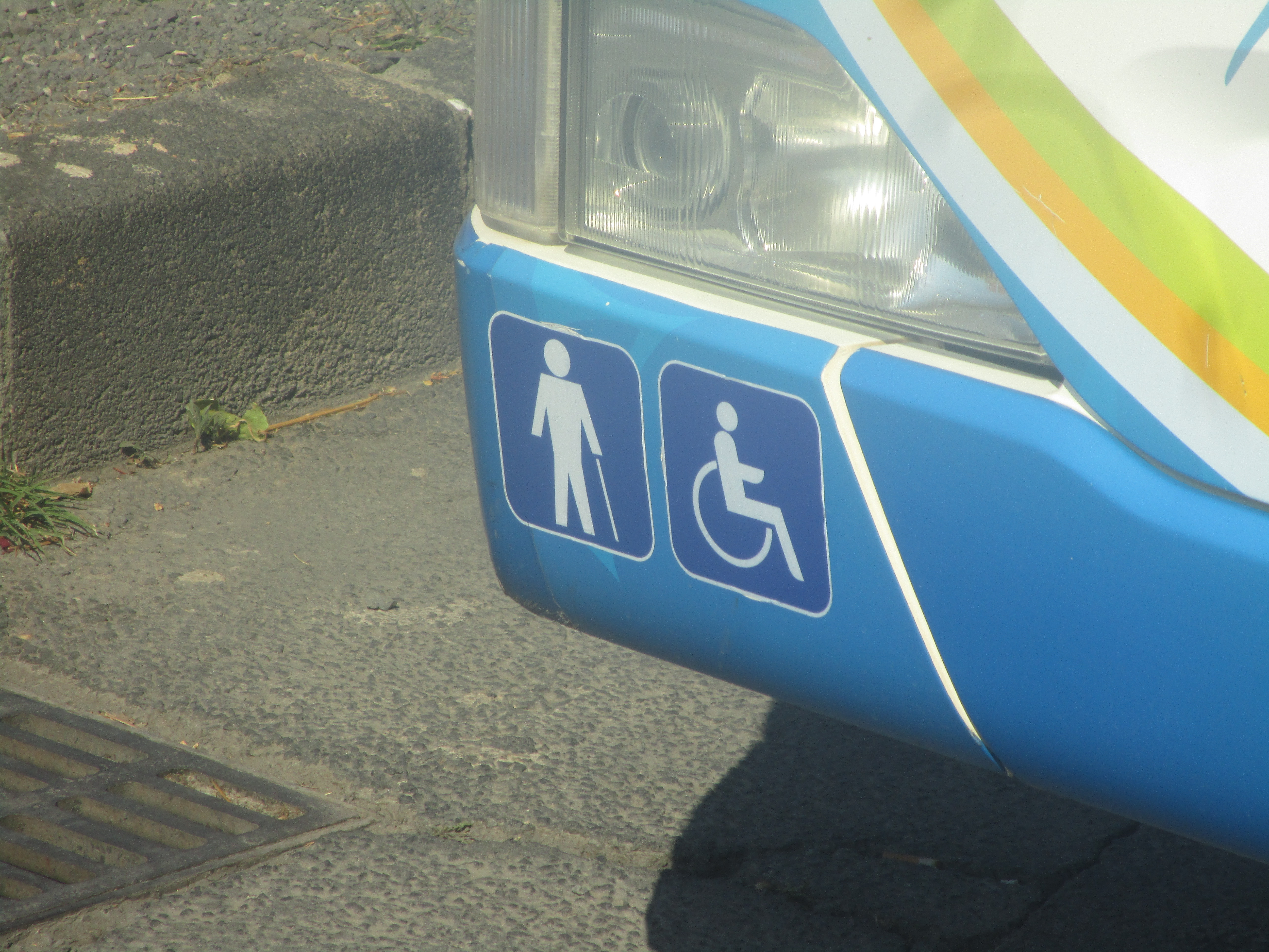 The accessibility symbols on the Mercedes-Benz Citaro C1 Facelift n°898 of Cap’Bus.